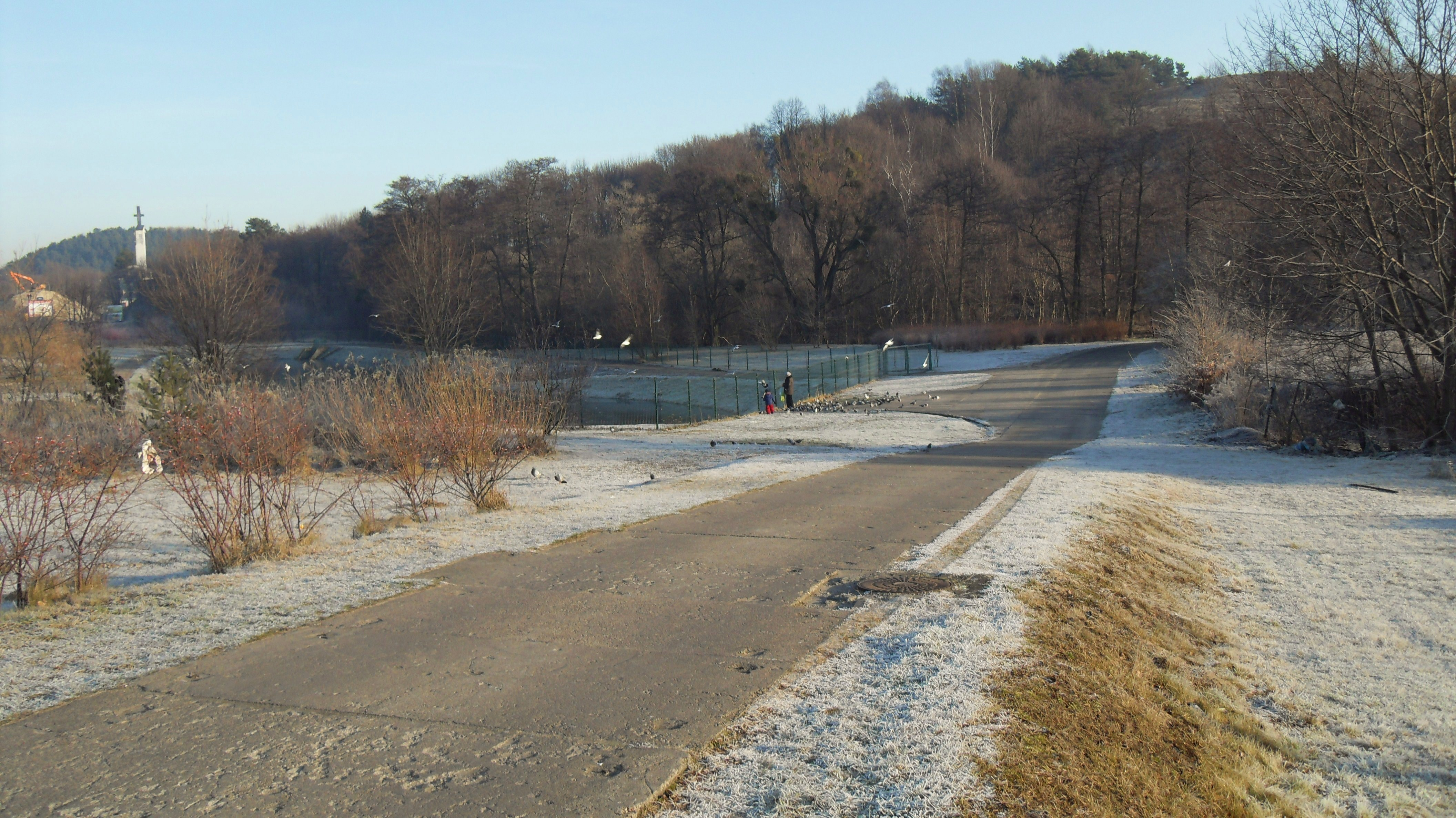 Gdańsk Brętowo, Lobkowski Dwór. Po lewej zbiornik retencyjny "Potokowa-Słowackiego".